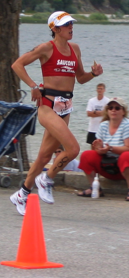 Lisa Bently winning Ironman Canada 2004